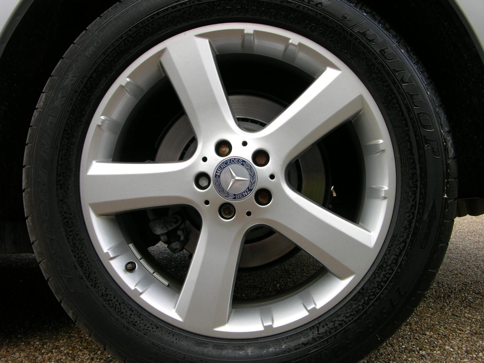 Mercedes Benz GL420 CDi 4-Matic